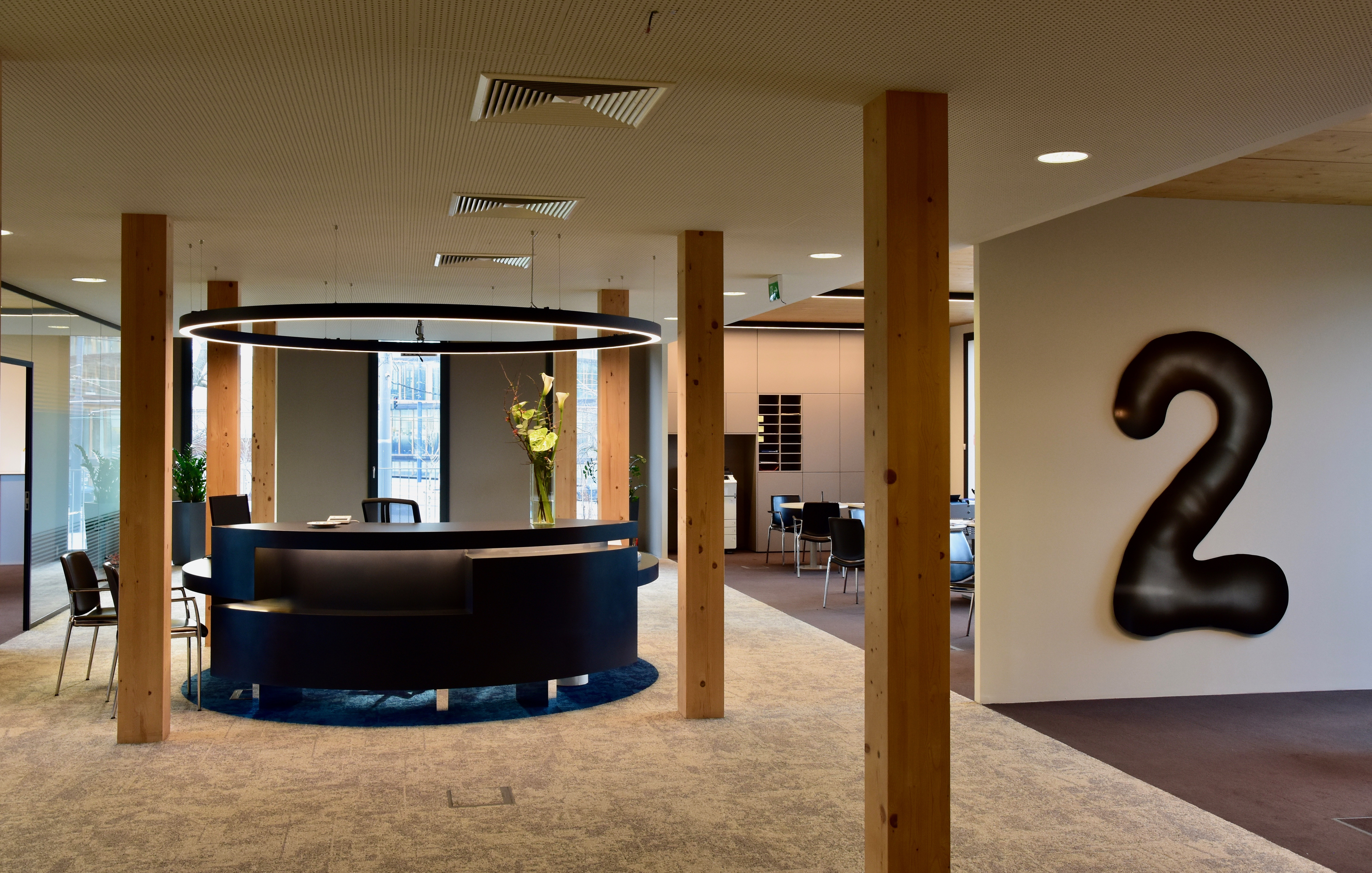 Filiale der zweiten Sparkasse von Innen.